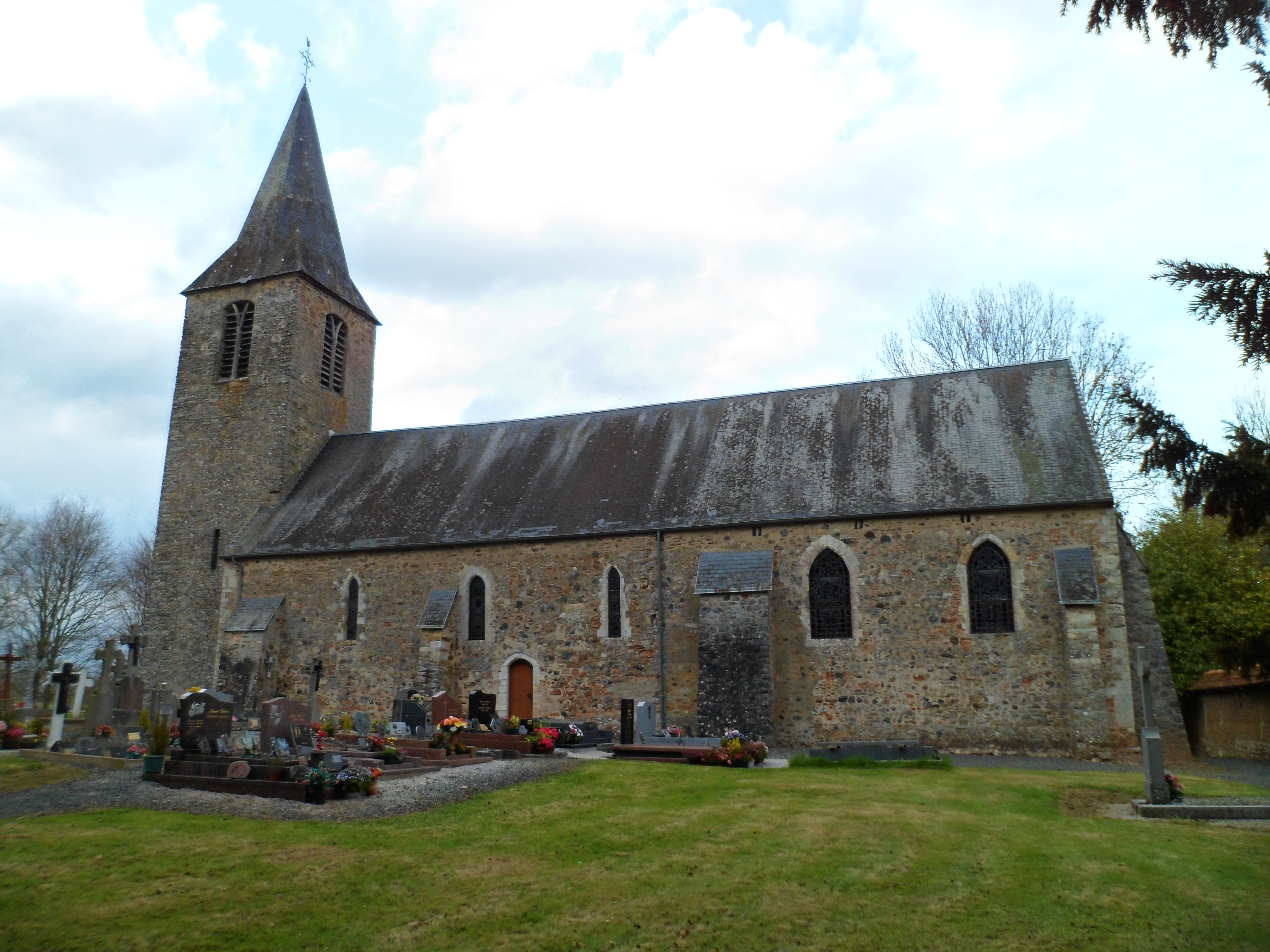 Église Notre-Dame d'Amigny